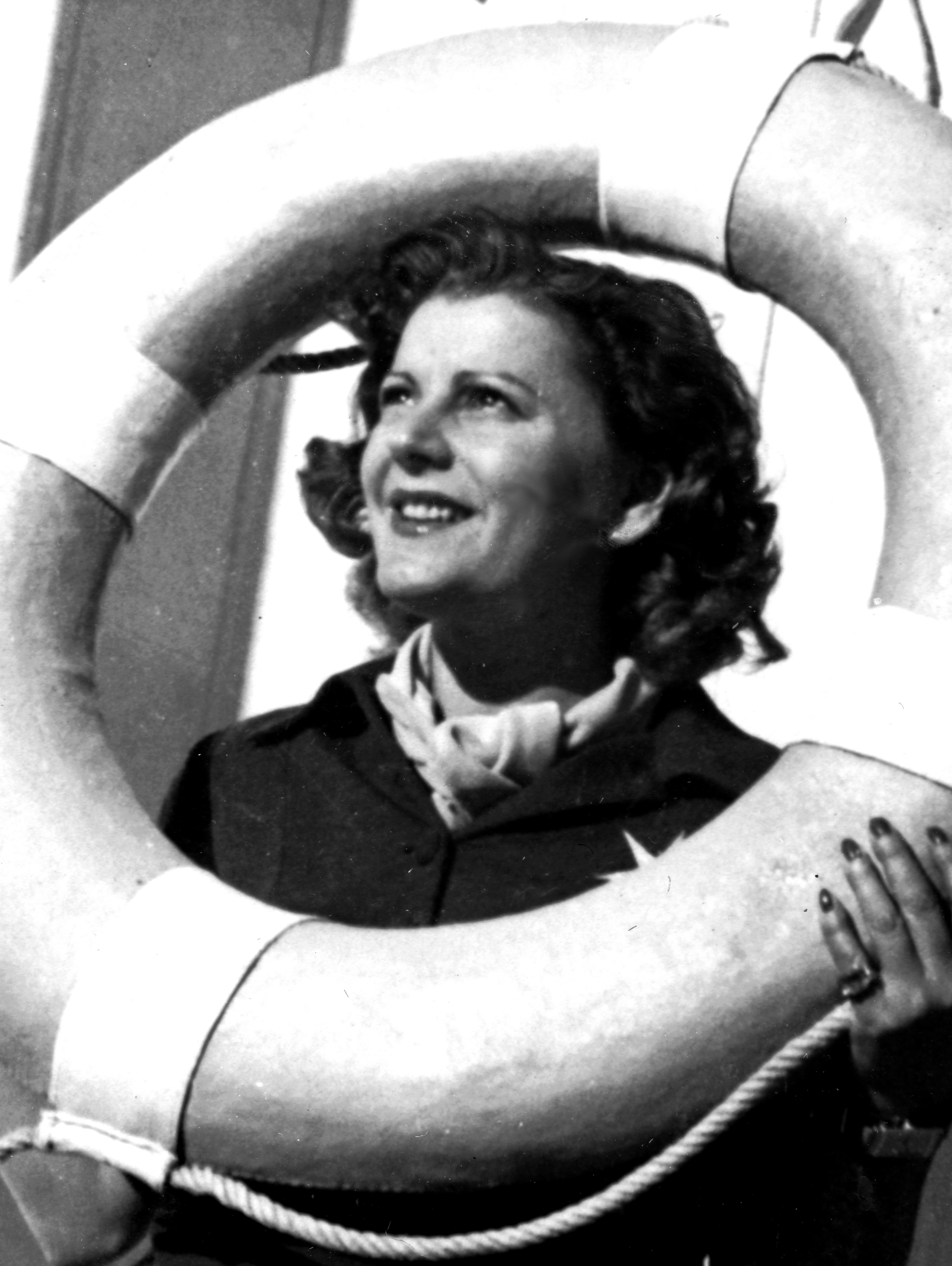 Turay Ida (született: Thurmayer Ida, Rákospalota, 1907. szeptember 28. – Budapest, 1997. június 2.) magyar színésznő, érdemes művész.